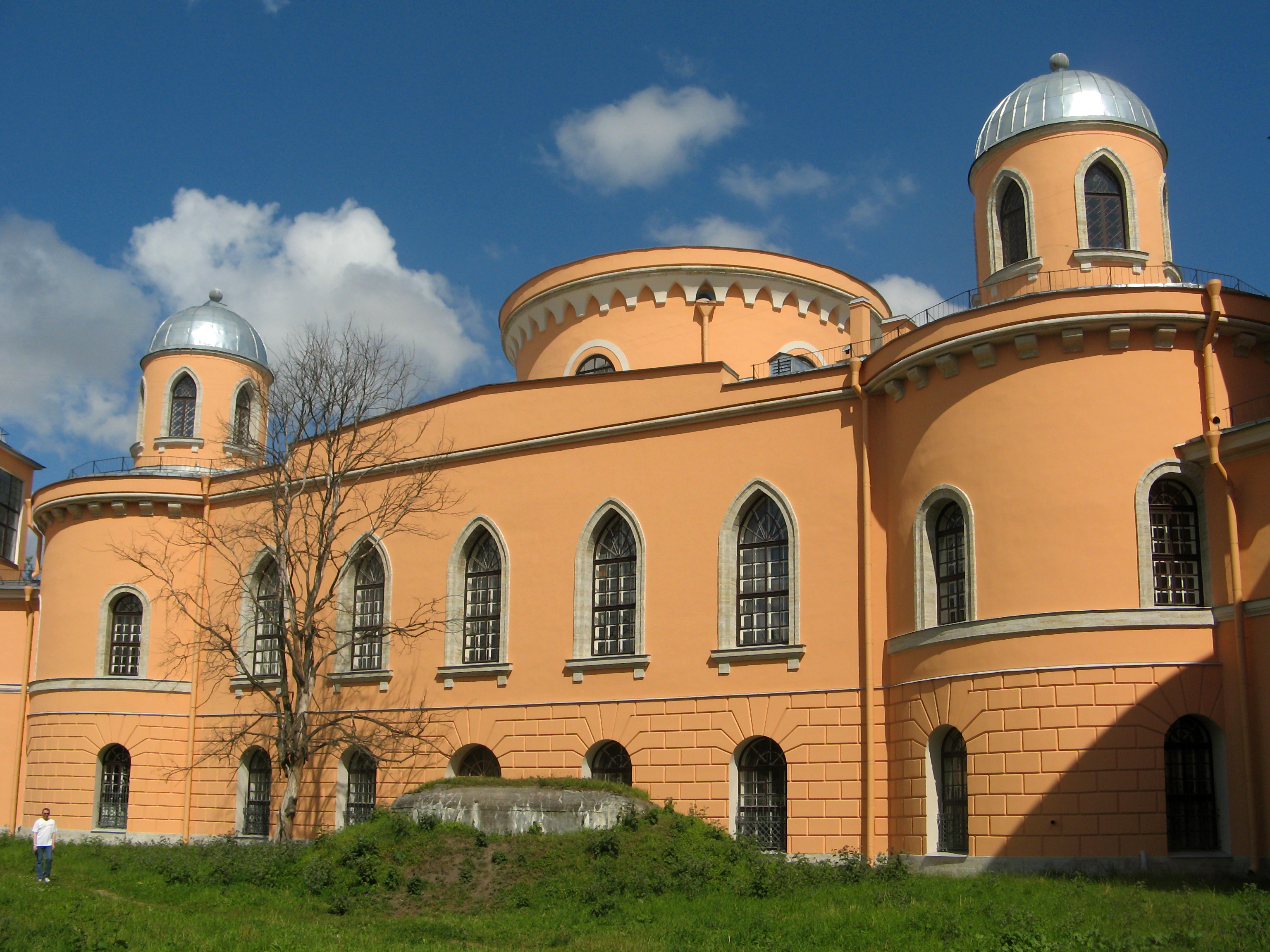 Чесменский дворец с флигелями: улица Гастелло, 15, Московский район, Санкт-Петербург